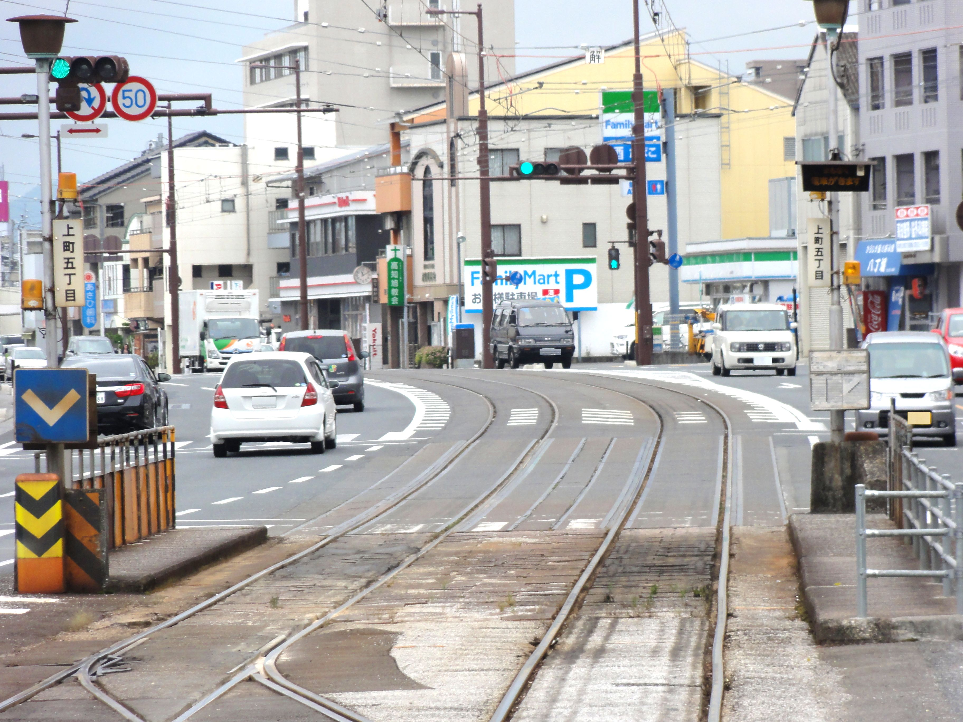 土佐電気鉄道上町五丁目電停。